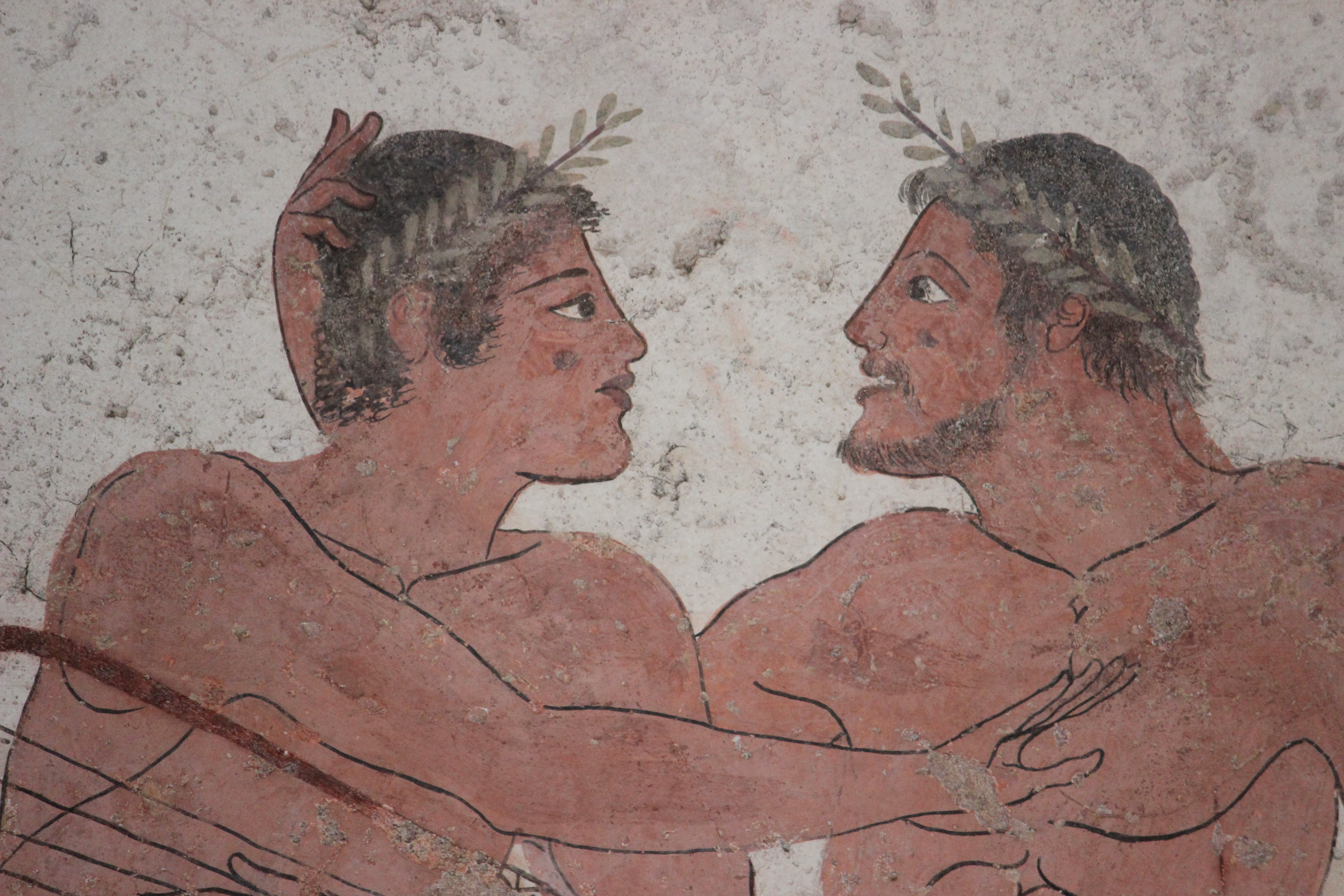 Paestum, Museo, pinturas de la tumba del nadador.